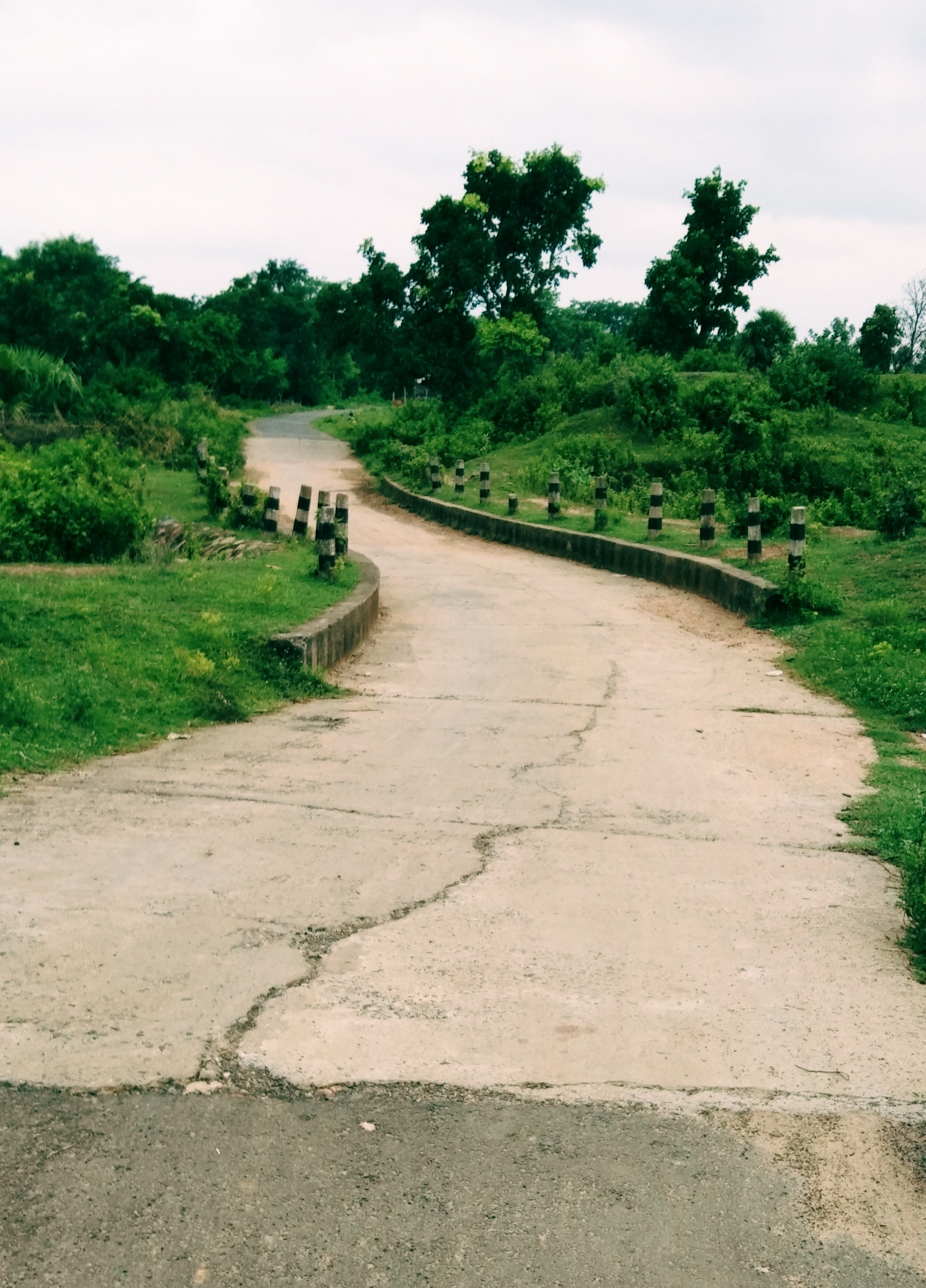 ধানাড়া